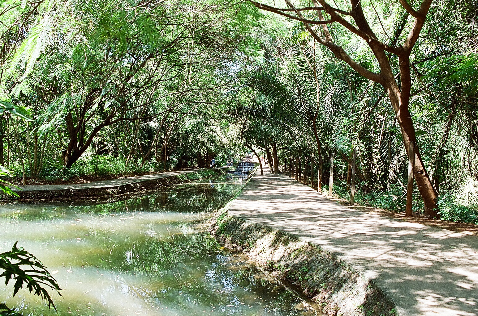 Bosque dos Buritis - Goiânia - Goiás - Brasil